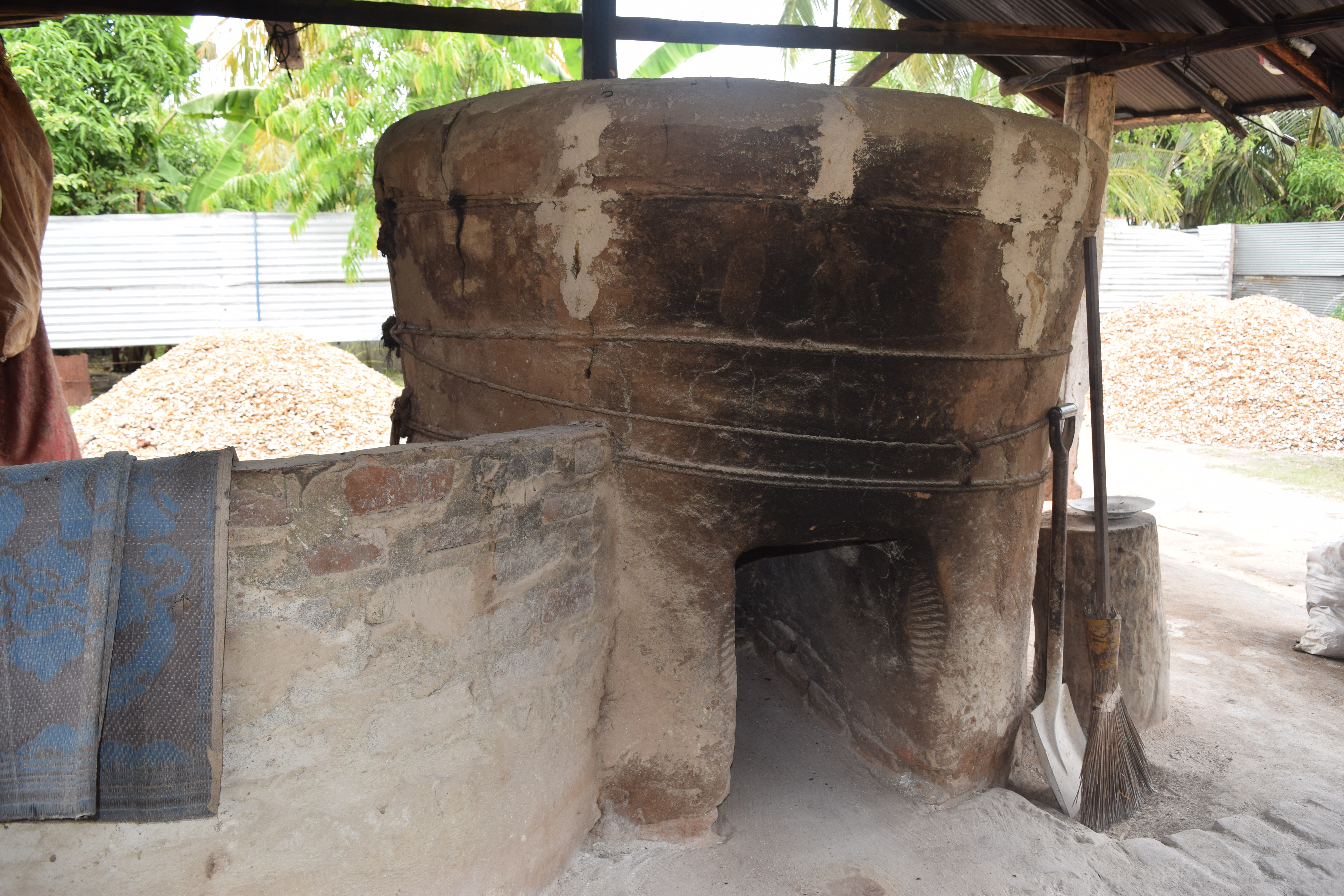 பாரம்பரிய சுண்ணாம்பு சூளை